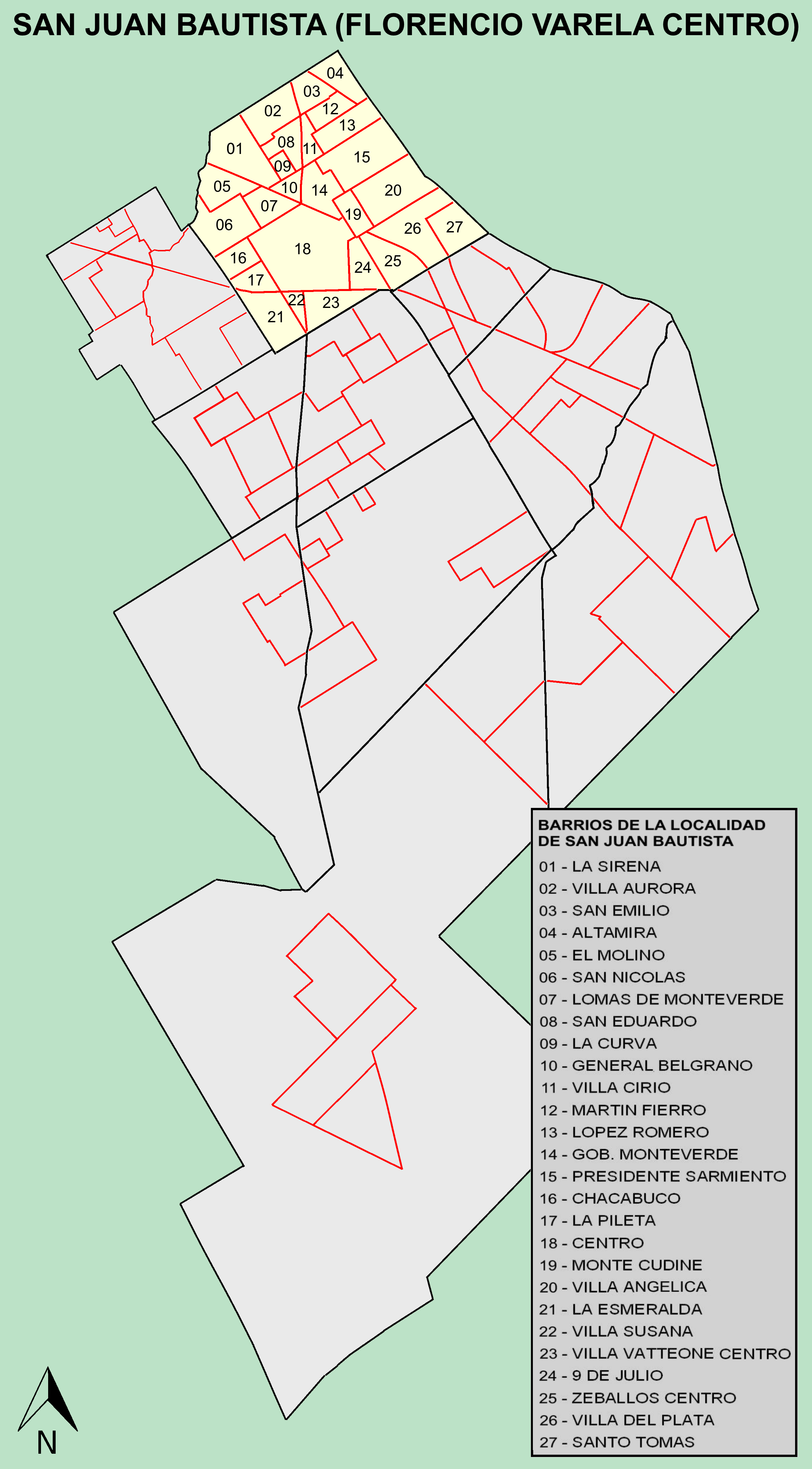 Mapa barrios de Florencio Varela Centro